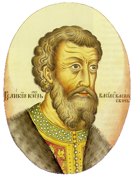 Vasili II. From Tsarskiy titularnik